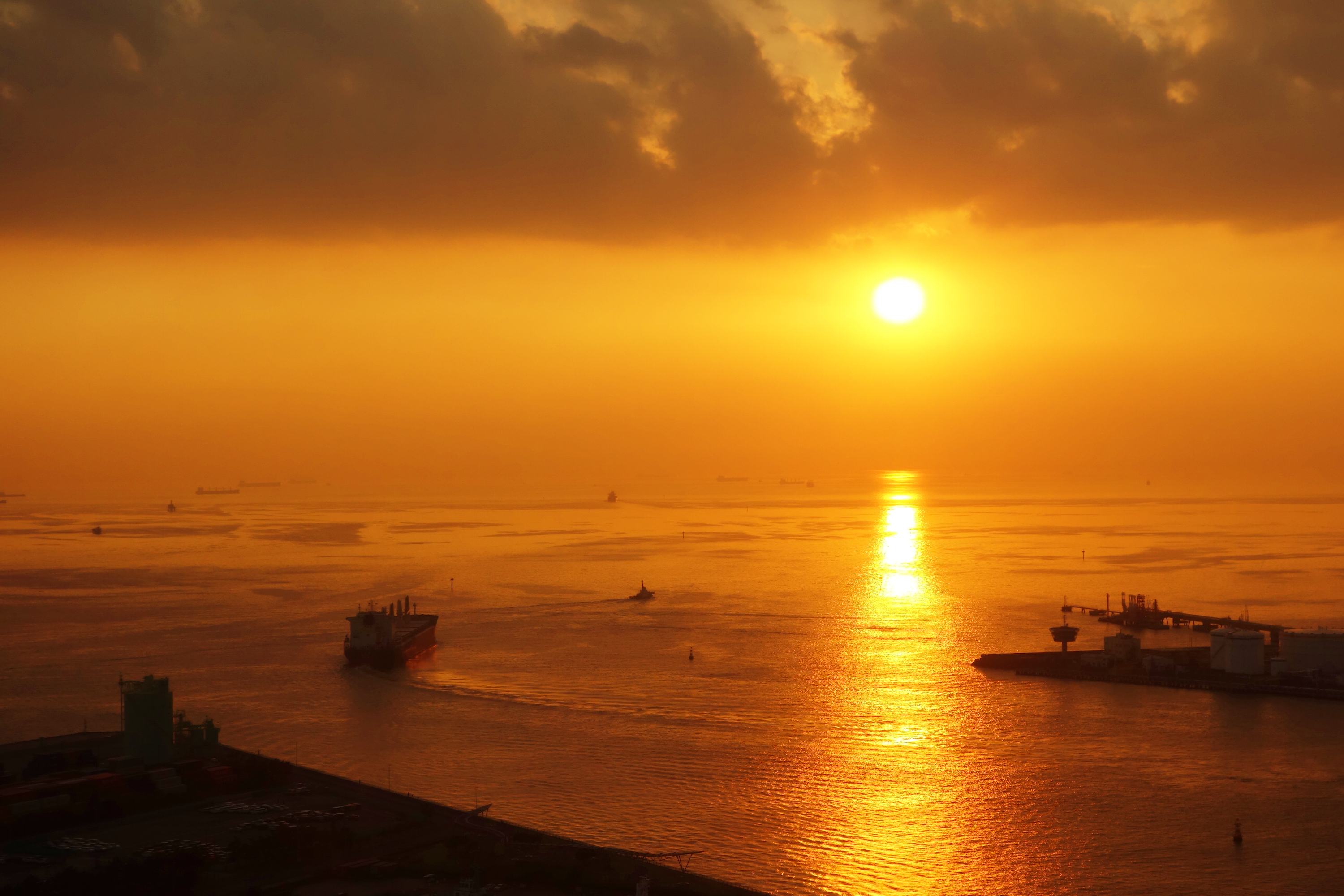 CC-BY-2.0 で Flickrにアップロードされていた画像。千葉みなとの夕焼け